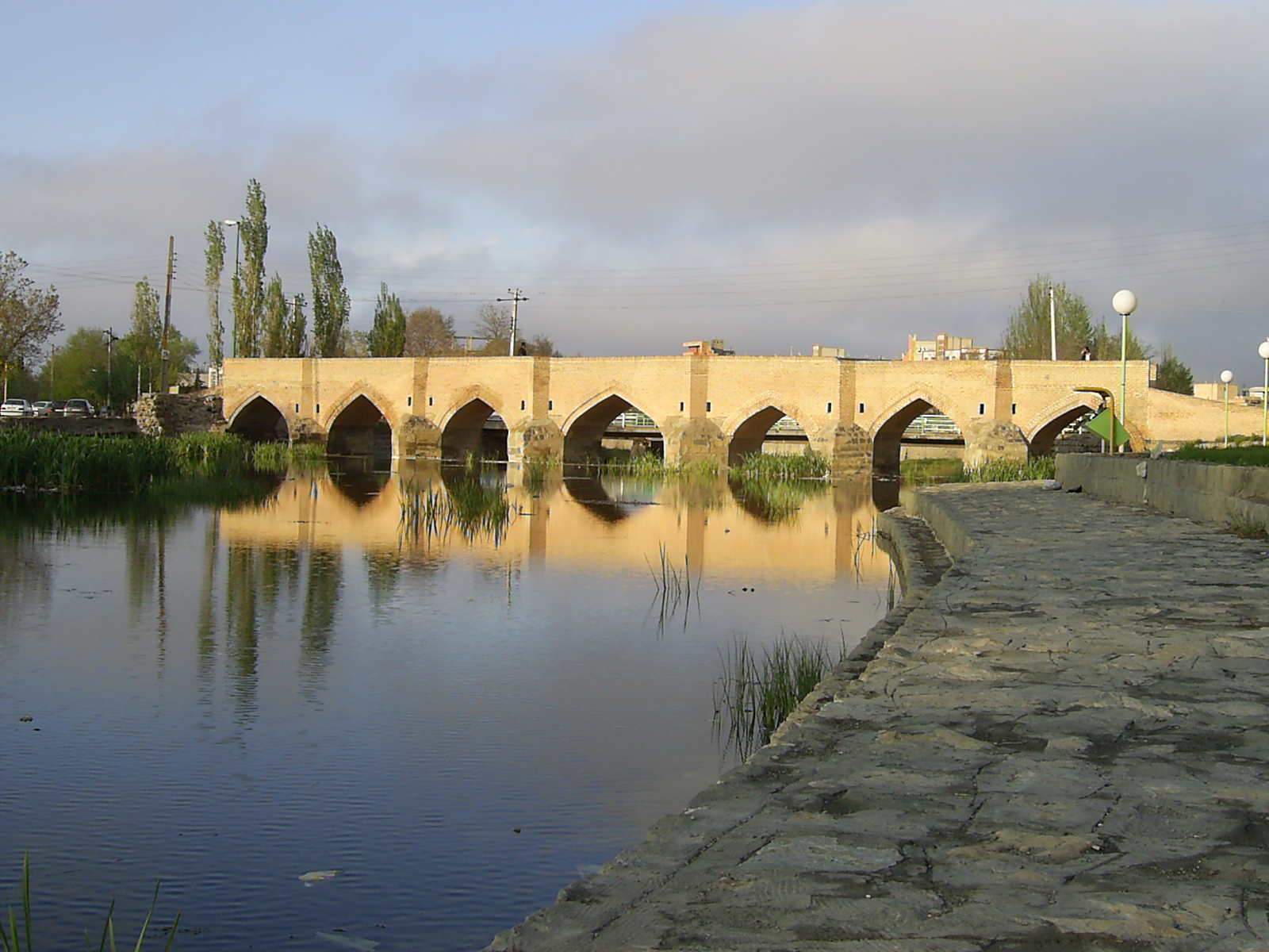 پل هفت چشمه ار